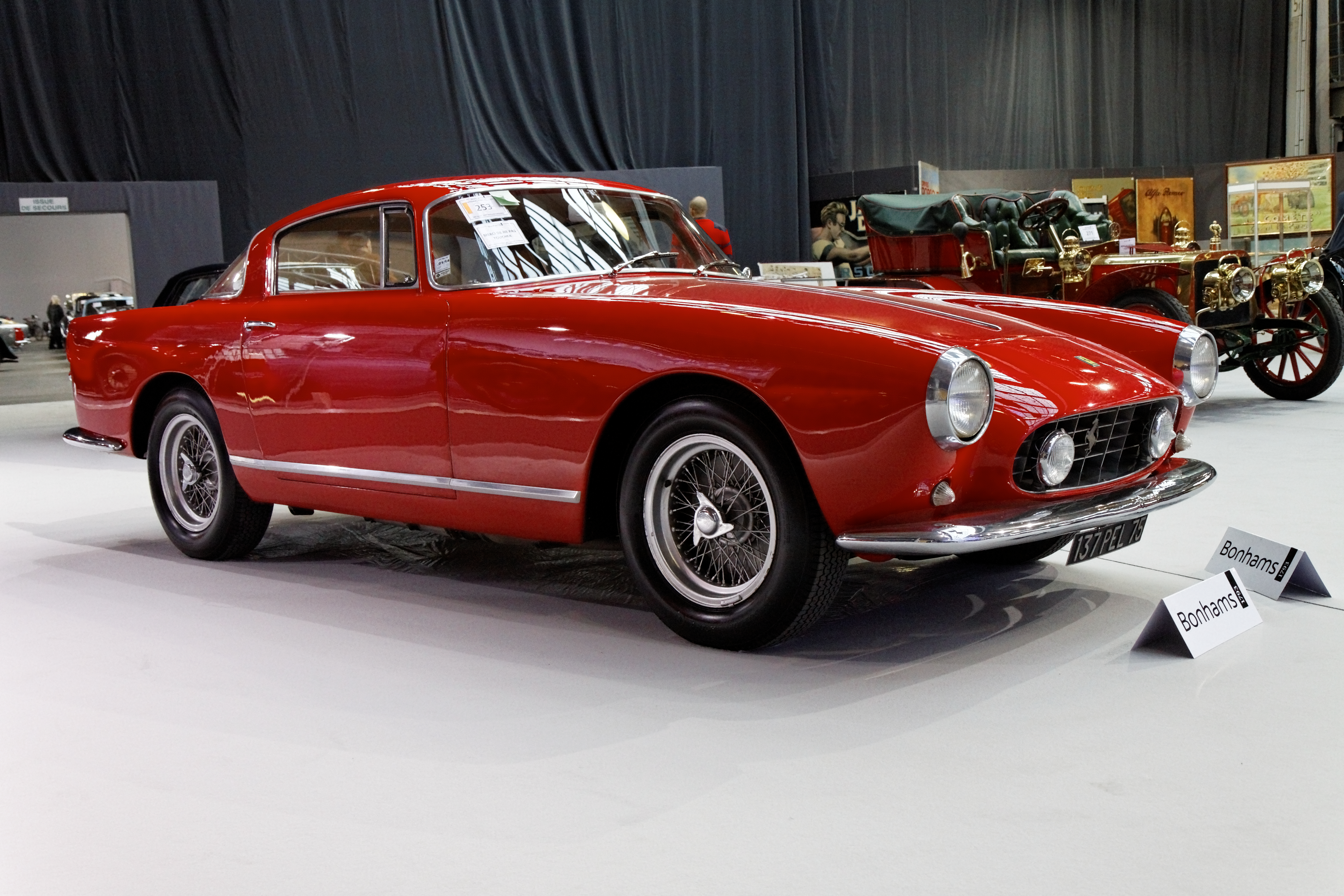 Ferrari 250GT Berlinetta